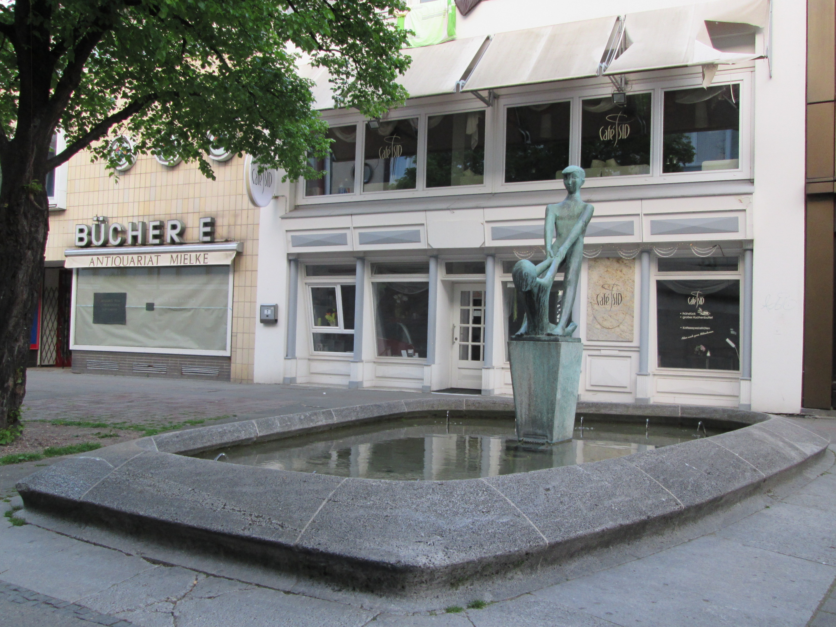 Brunnen mit Plastik "Spielende Kinder" - Hannover-Mitte Grupenstraße